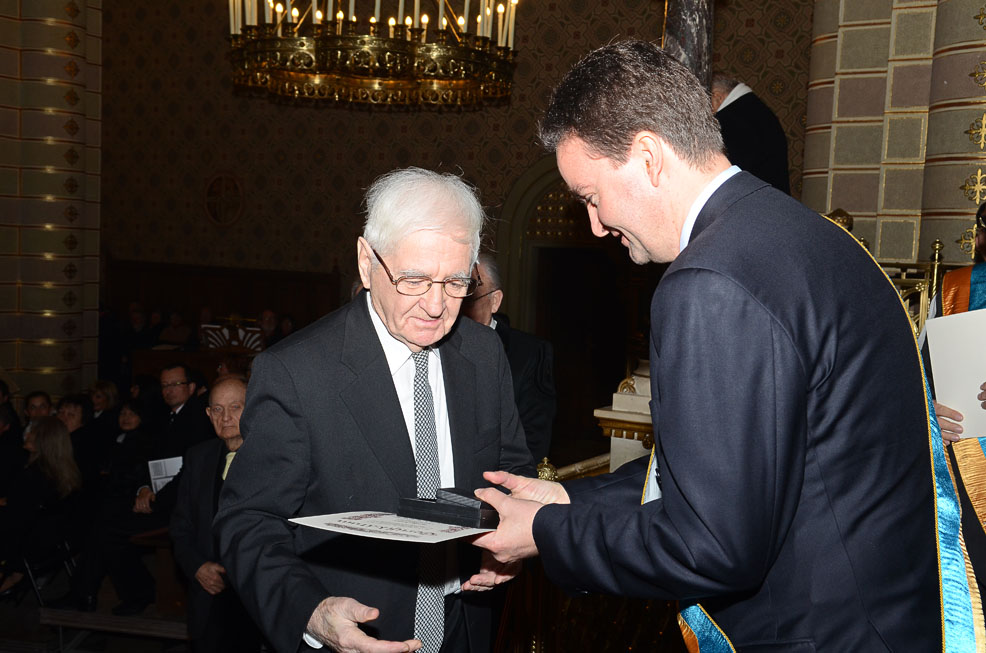 Bánky József